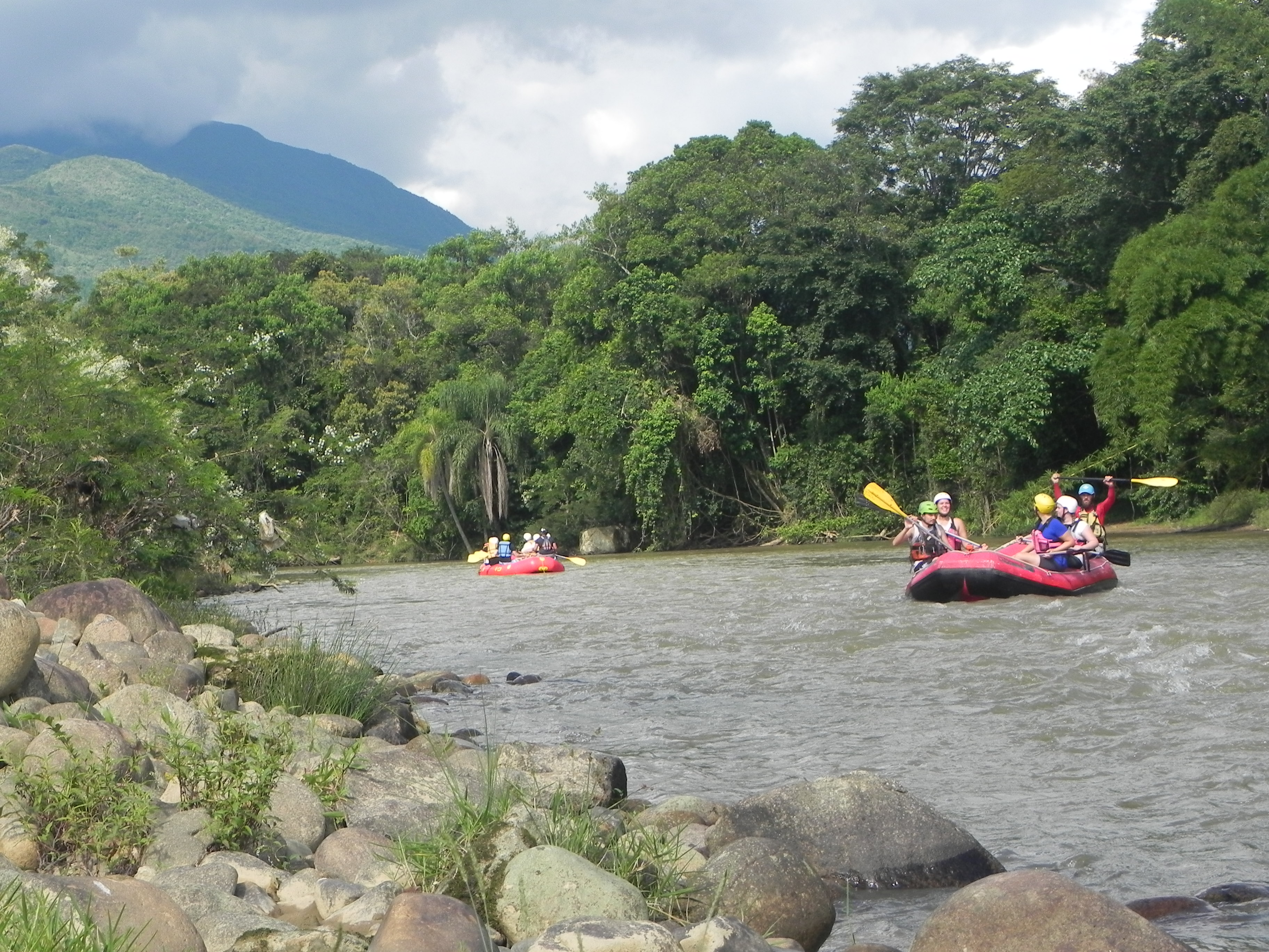 Rafting no Rio Cubatão do Sul, logo atrás com algumas nuvens o maravilho pico do tabuleiro.